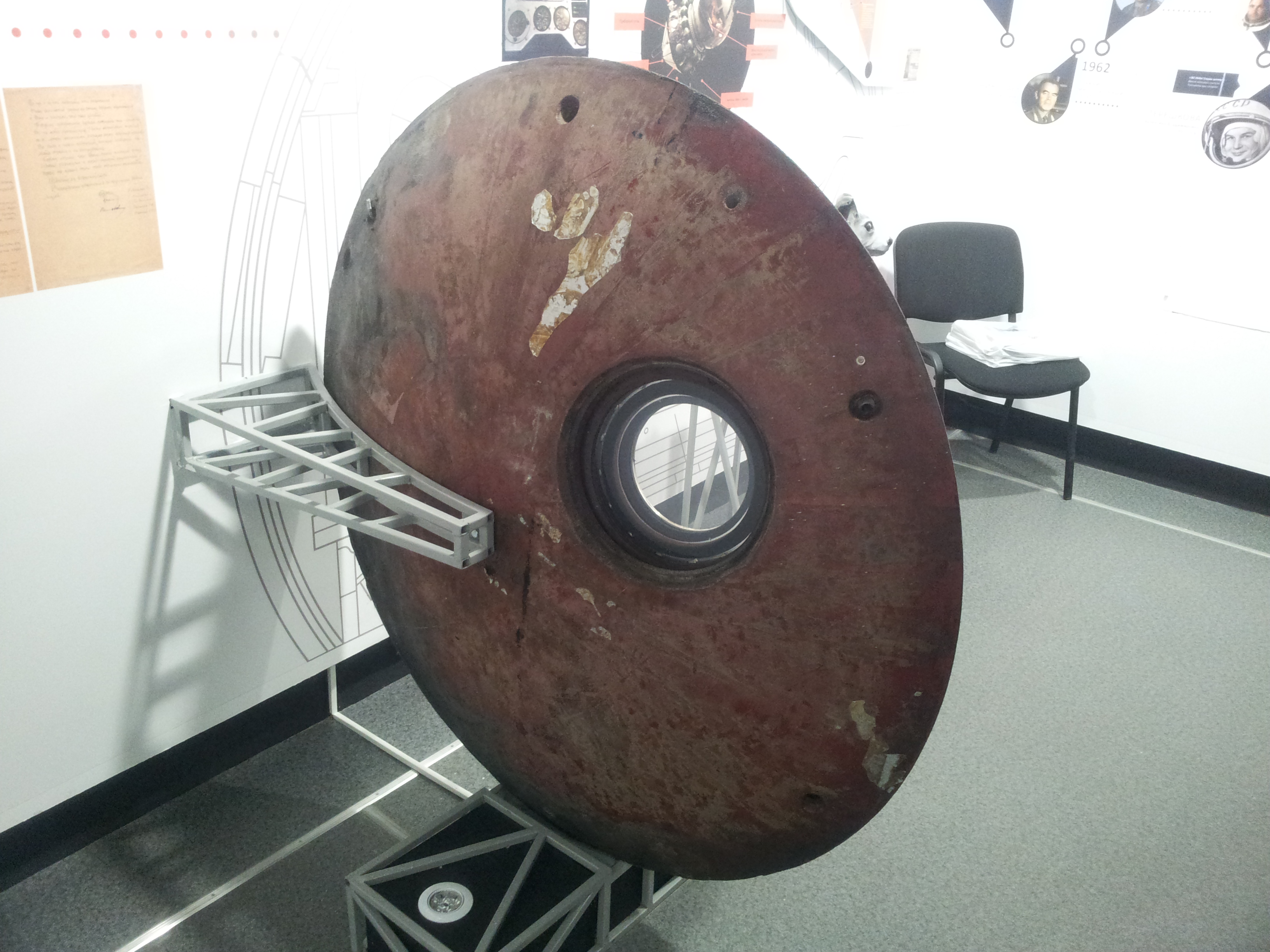 Originale Einstiegsluke des Sputnik-10 (Korabl-5), ausgestellt im Landeskundlichen Museum der Stadt Tschaikowski.